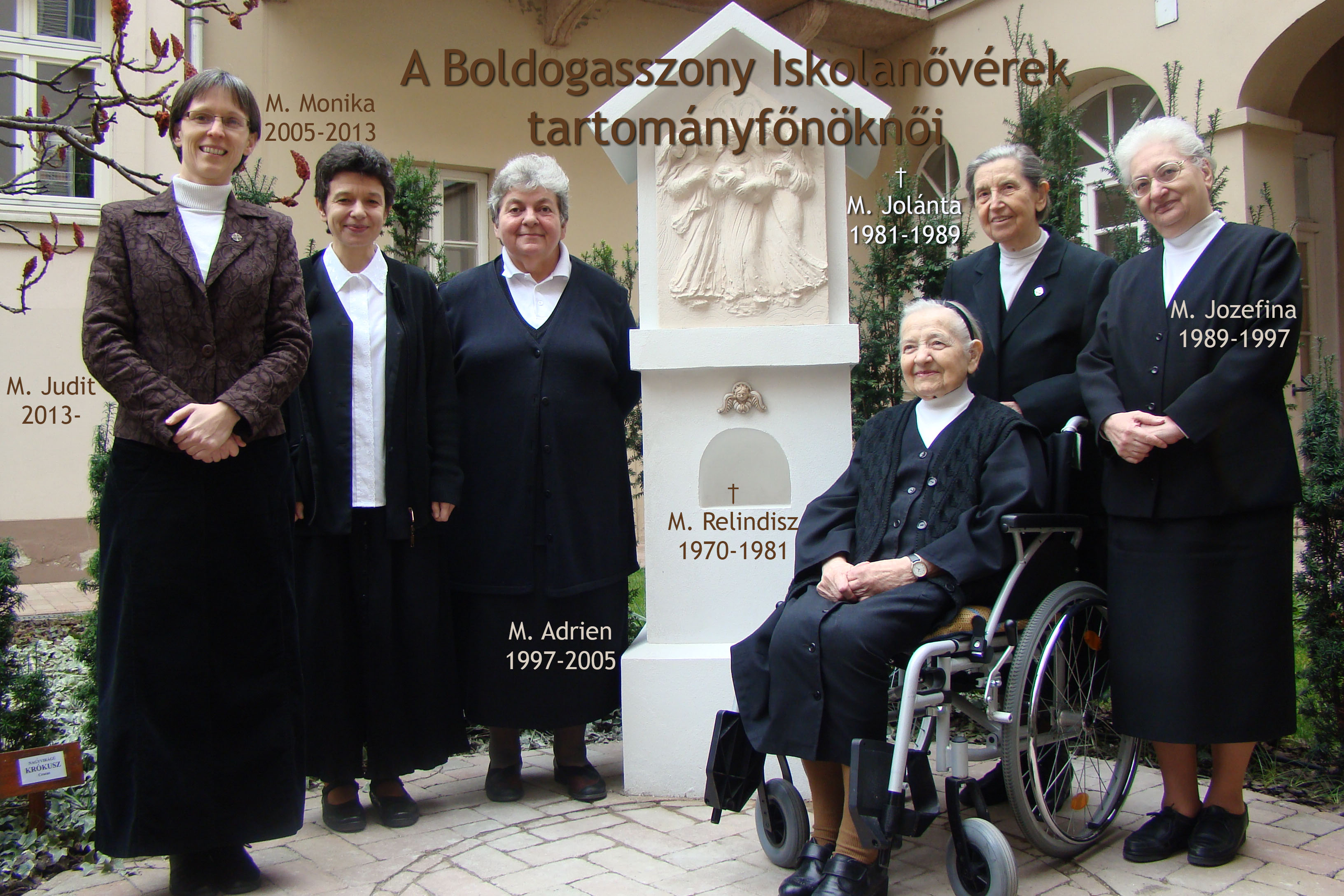 Csoportkép a budapesti rendház kertjében. A középen látható dombormű Petrás Mária alkotása.